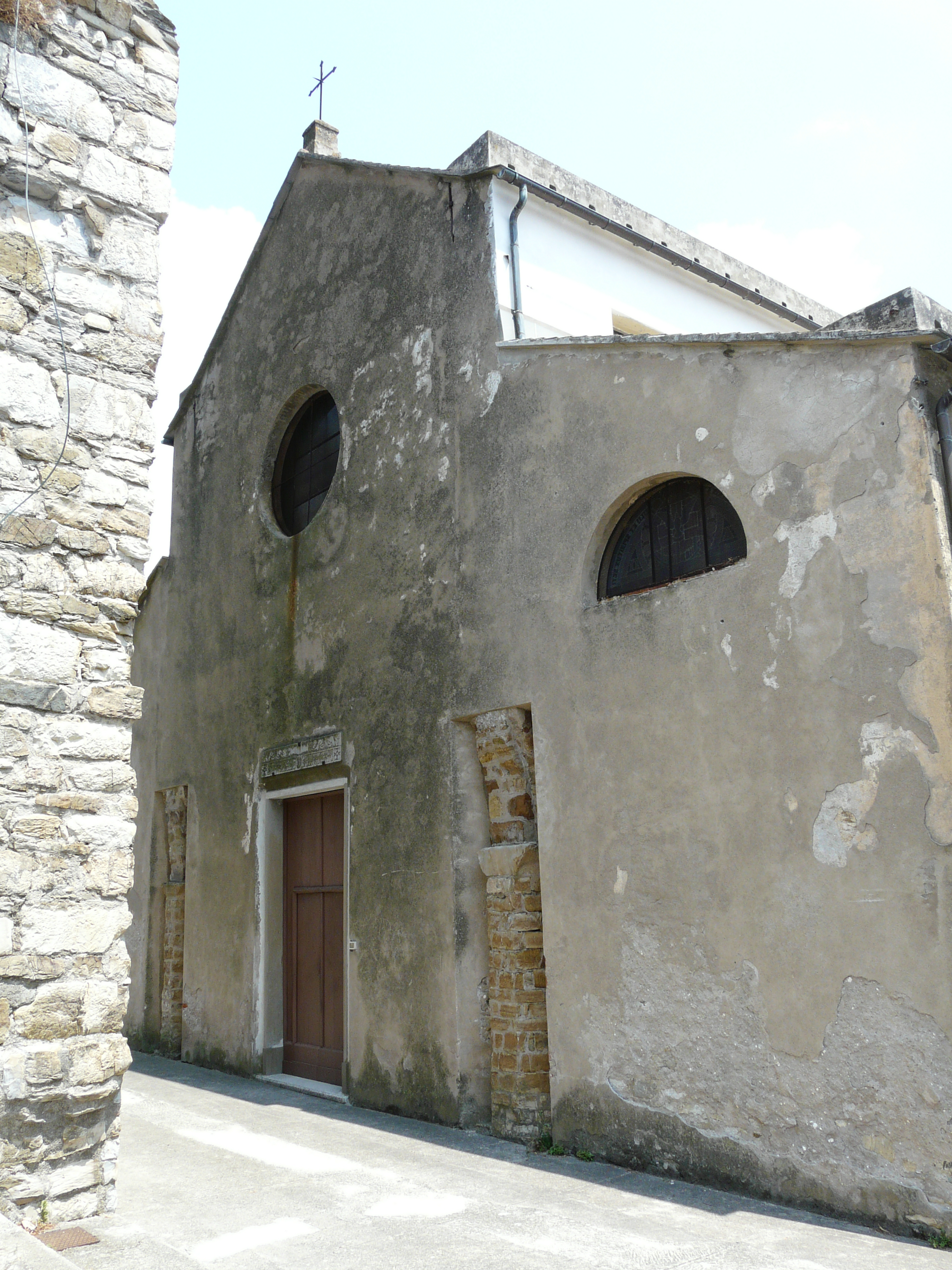 Chiesa di San Martino presso la frazione Costa di Framura, Liguria, Italia